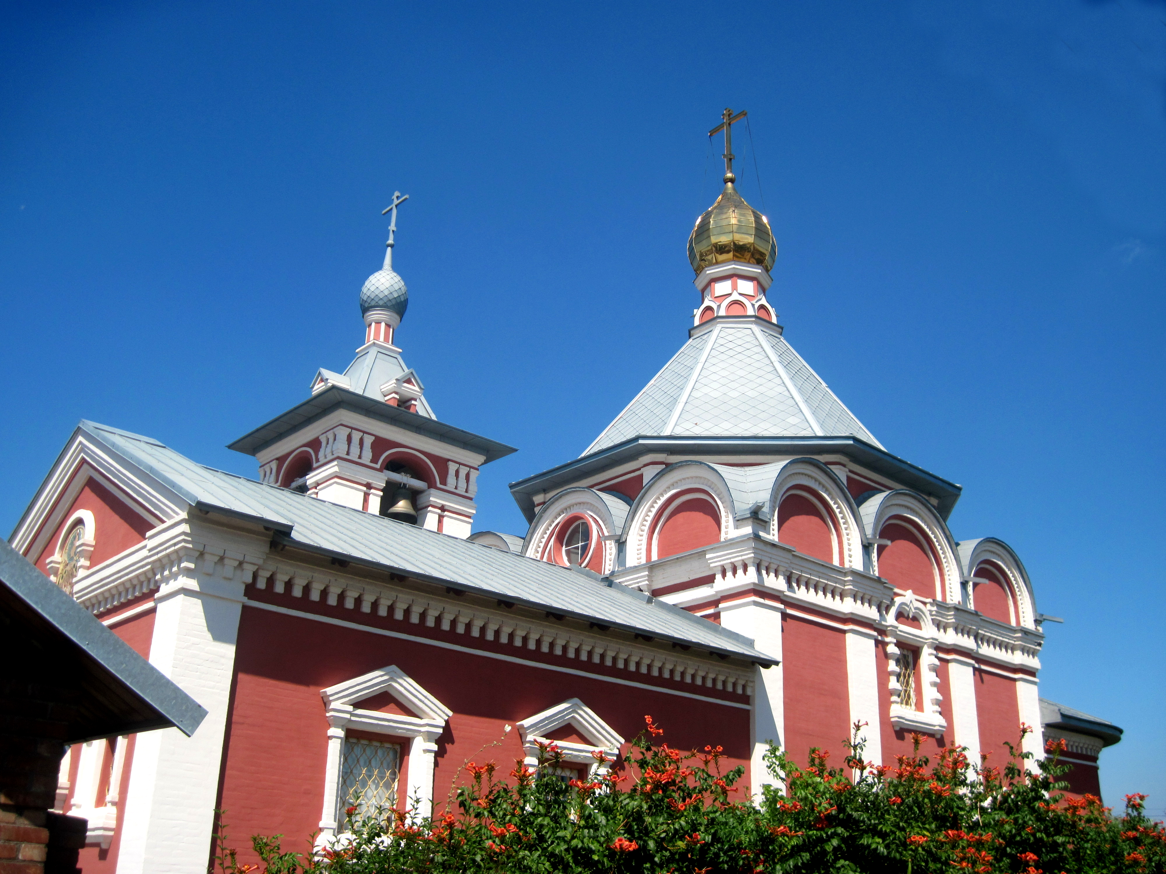 Храм вознесения Христова: Ростовская область, г. Батайск, пос. Койсуг, ул. Цимлянская, 16а